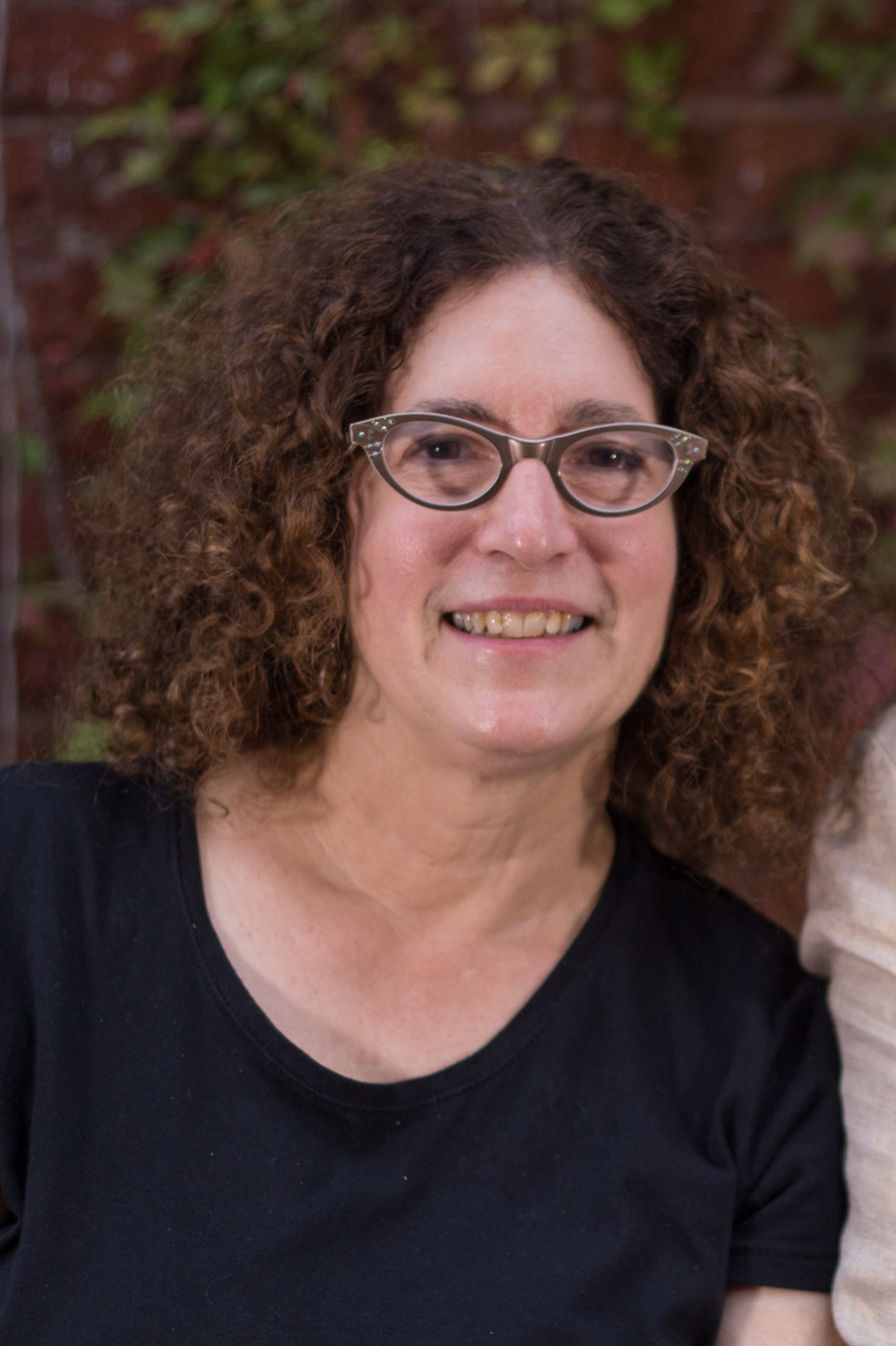 Portrait réalisé à la Cinémathèque québécoise dans le cadre du 5 à 7 des Sommets du cinéma d’animation.